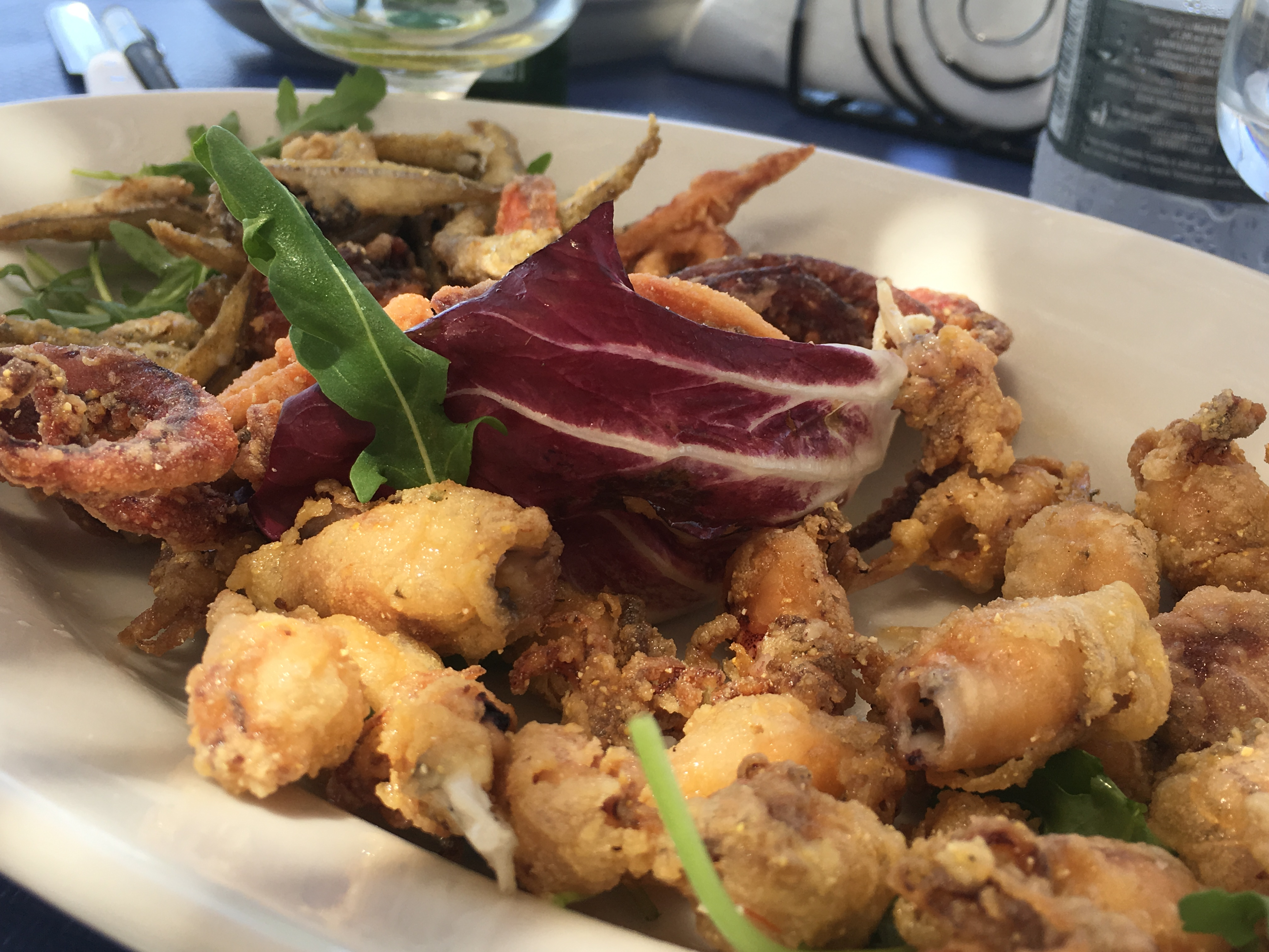 Fritto a base di pesce